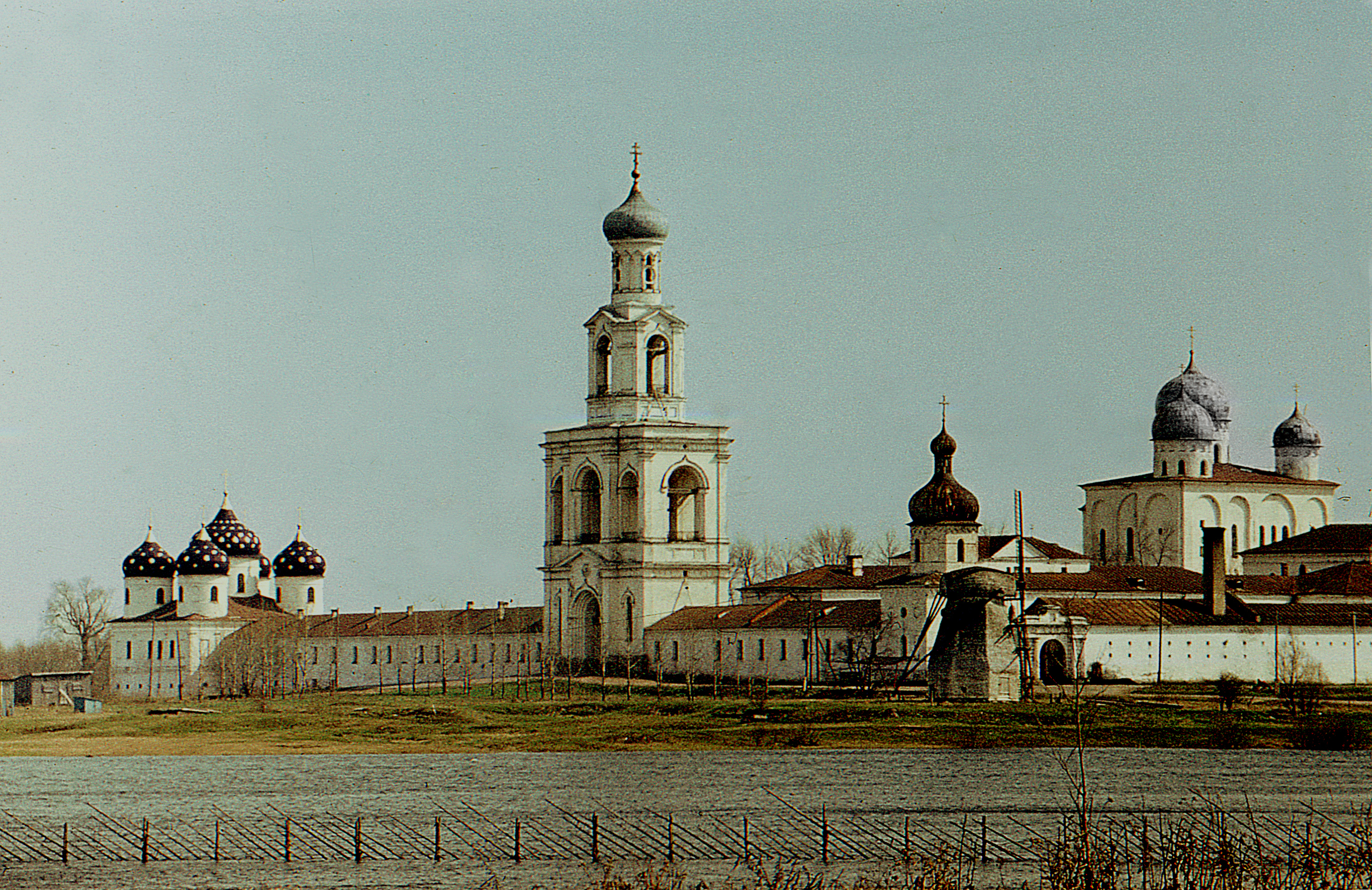 Новгород. Юрьев монастырь